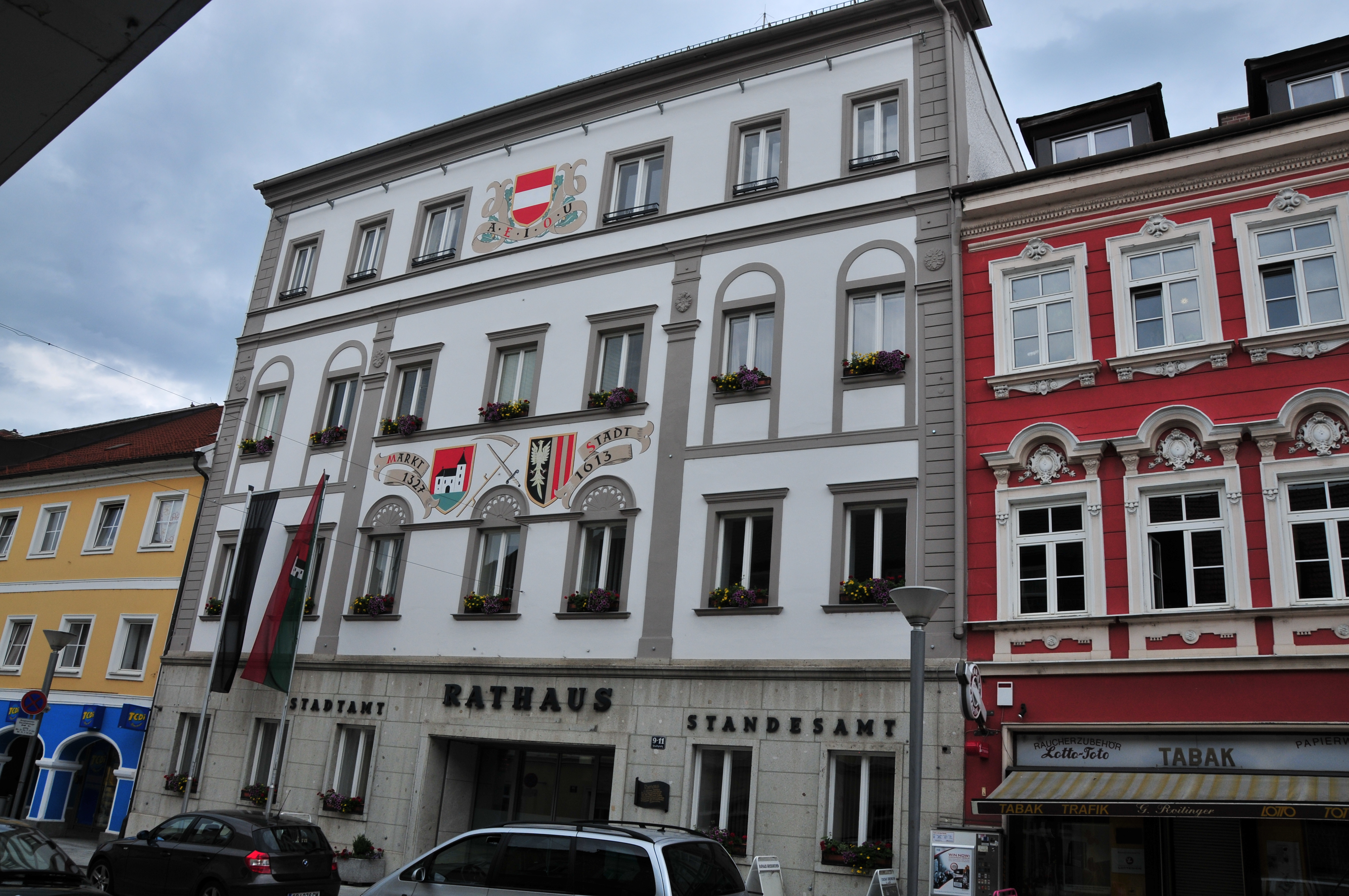 Rathaus/Gemeindeamt